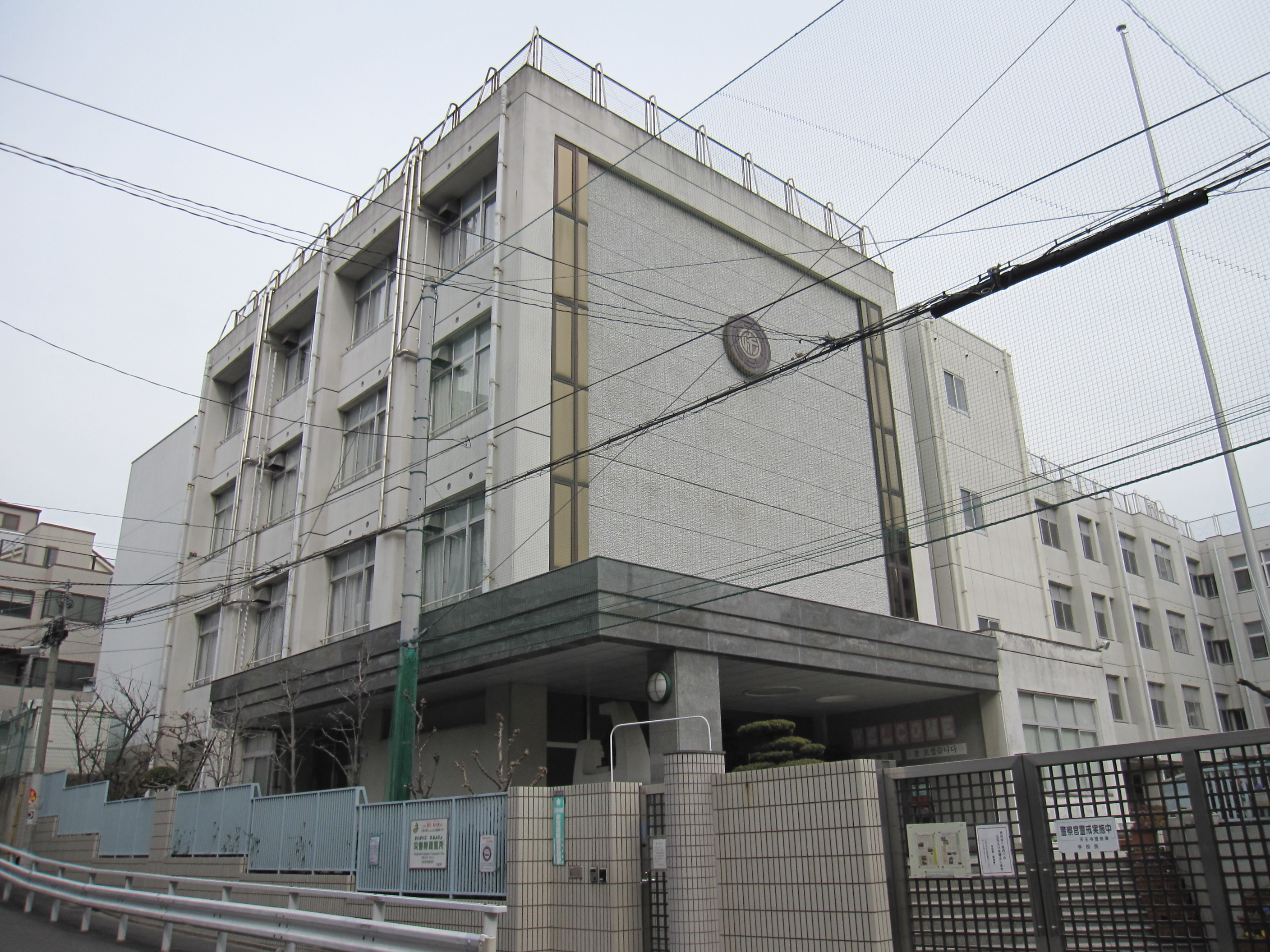 大阪市立味原小学校 Canon IXY Digital 920 IS